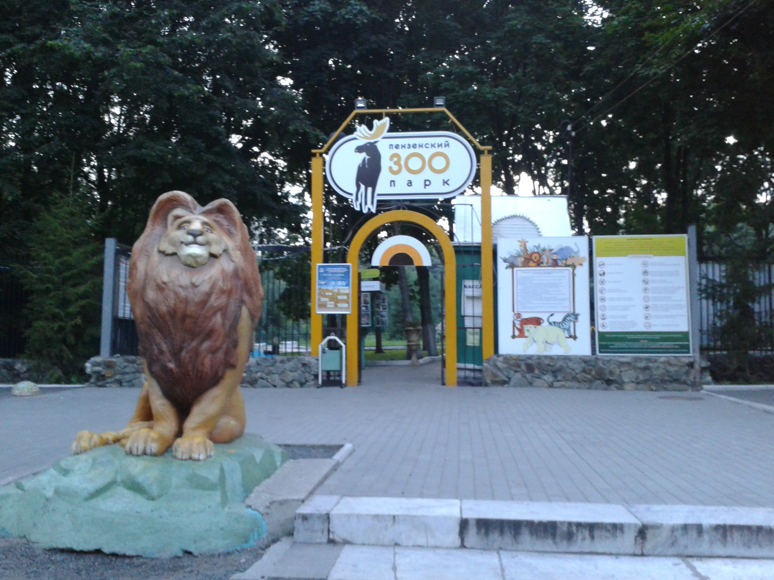 Пензенский зоопарк. Вход на территорию